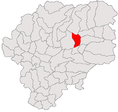 Categorie:Hărţi ale judeţului Bistriţa-Năsăud